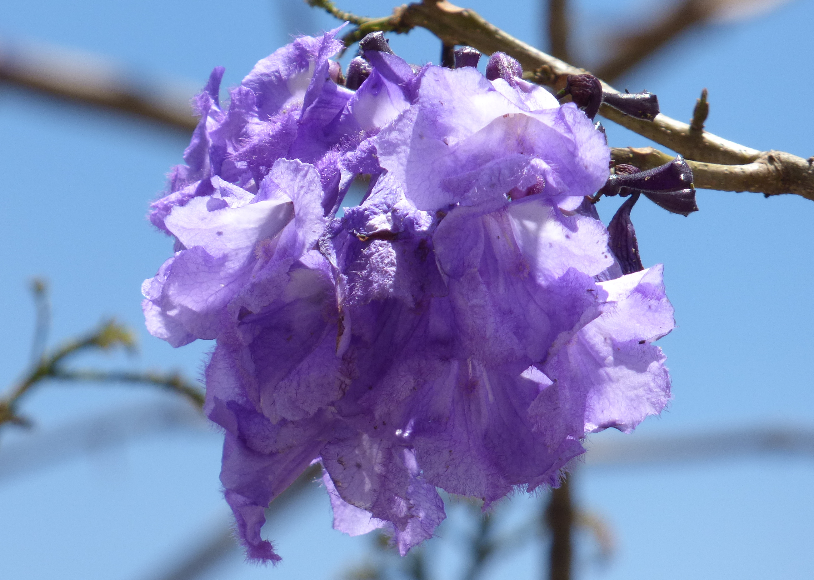 Gualanday (Jacaranda caucana)